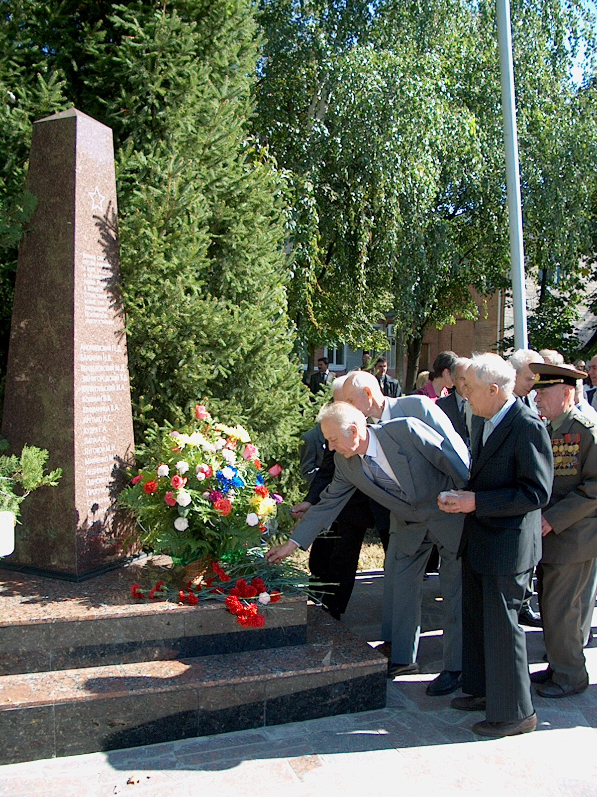 Пам’ятний знак полеглим воїнам – робітникам електростанції, Полтава, вул. Пролетарська, 31. Покладення квітів ветеранами на День Перемоги